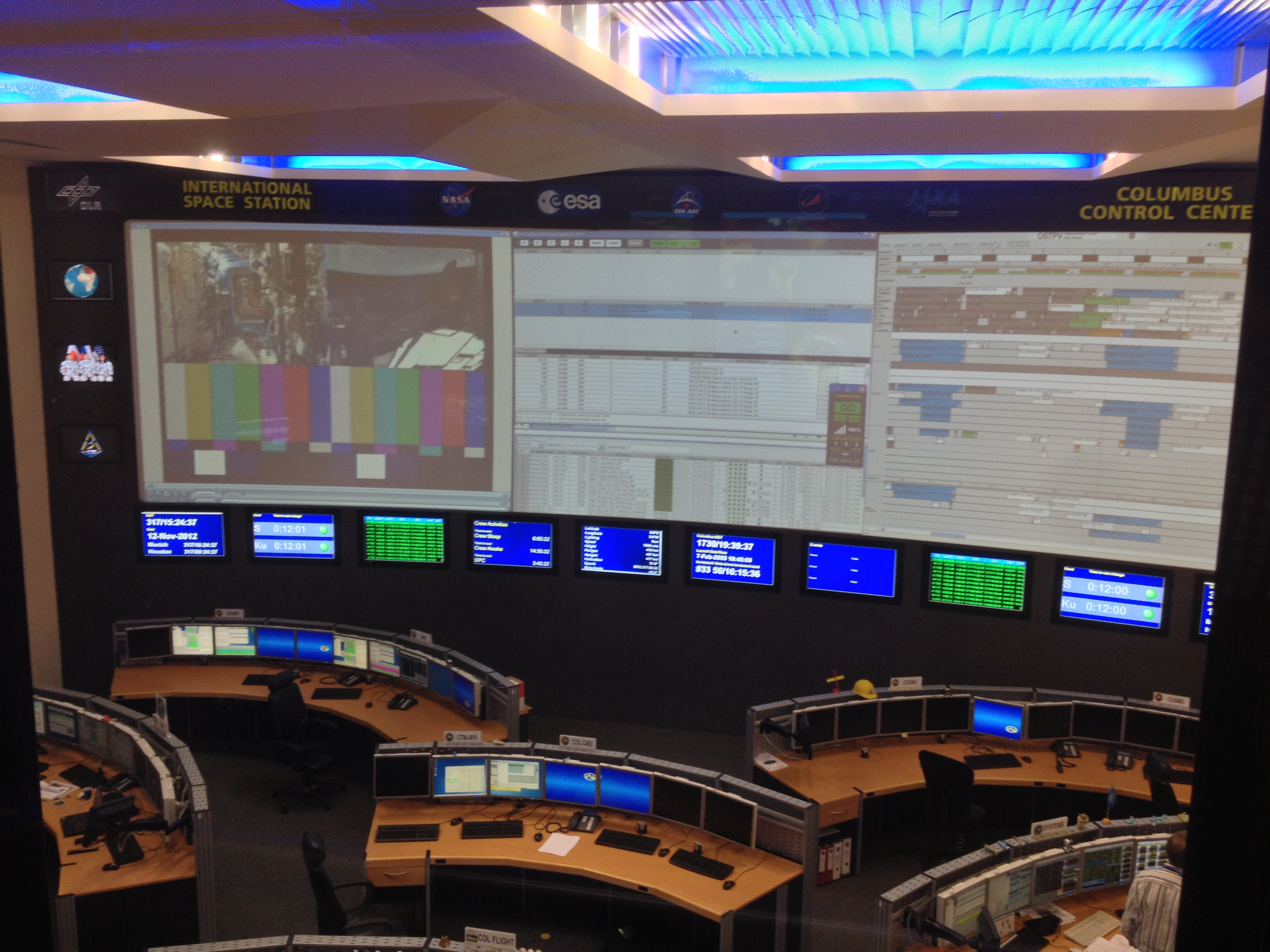 Image: DLR (CC-BY 3.0)